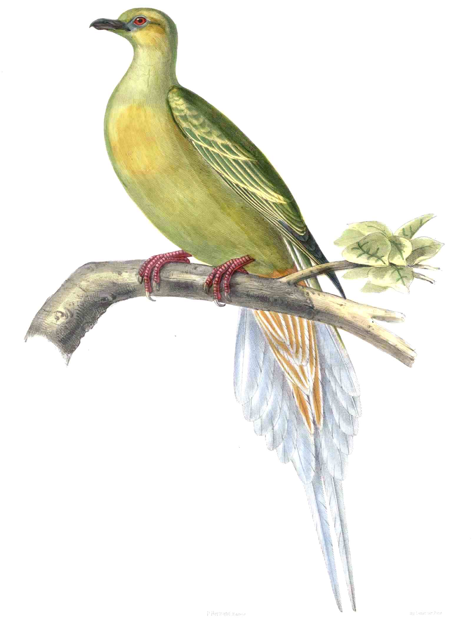 Sphenocercus apicaudus (=Treron apicauda)